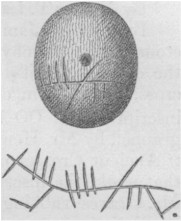 Die Ennis-Perle Ogham-Inschrift stammt aus dem 5. - 7. Jahrhundert. Die Abbildung ist von 1856. Die 2,1 cm große Perle ist aus Bernstein und stammt aus Ennis, Grafschaft Clare, Irland. Sie ist im British Museum in London ausgestellt und hat die Registrierungsnummer 1888,0719.119. Der irische Archäologe R. A. S. Macalister überträgt, allerdings mit Vorbehalt, in seiner 1945 erschienenen Veröffentlichung "Corpus Inscriptionum Insularum Celticum" (CIIC Nr. 53) die Ogham-Inschrift mit ATUCMLU und hält die Inschrift für eine magische Formel. Foto der Ennis-Perle Zeichnung von 1840